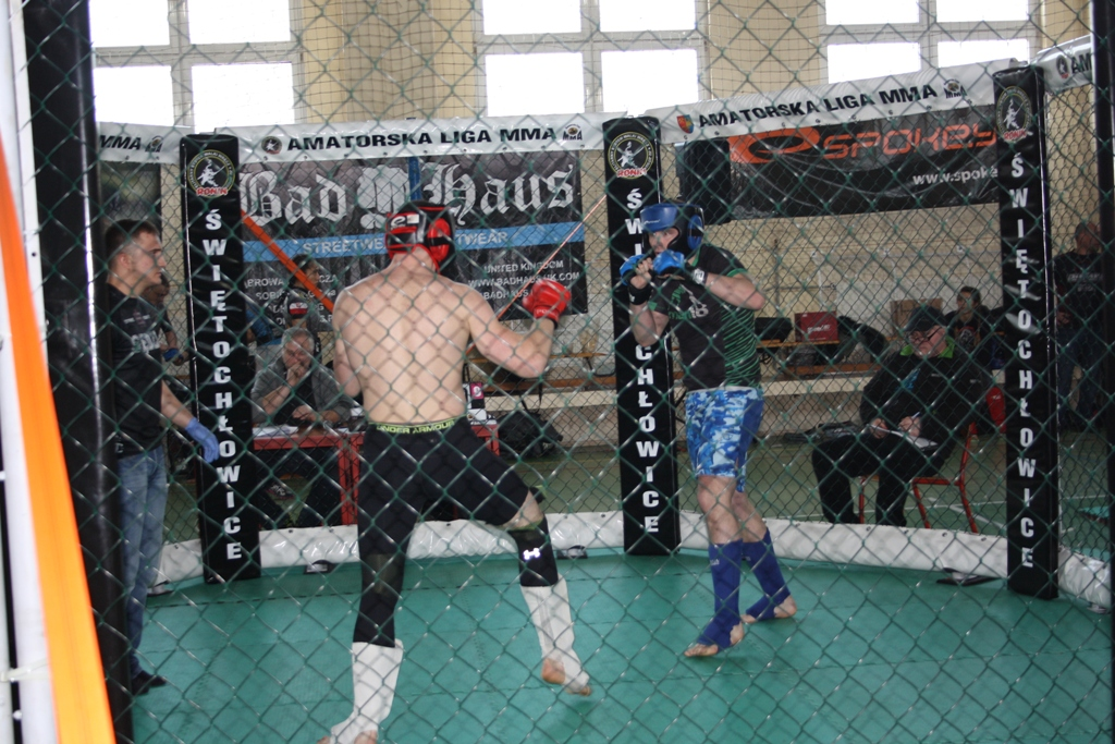 Zawody Amatorskiej ligi MMA 74 w Świętochłowicach - walki finałowe odbywające się w klatce.